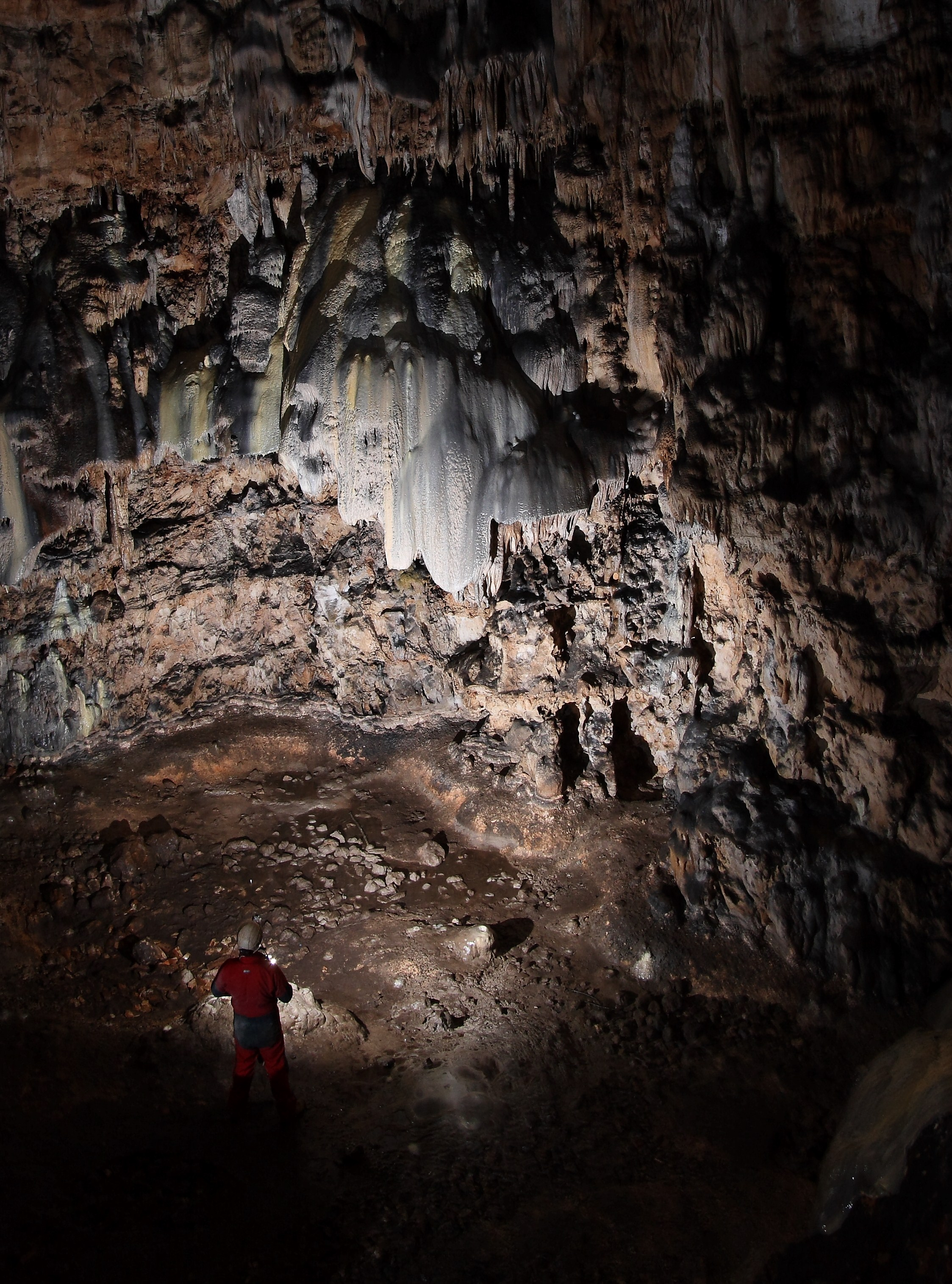 particolare di Drappo stalattitico all'interno delle Grotte